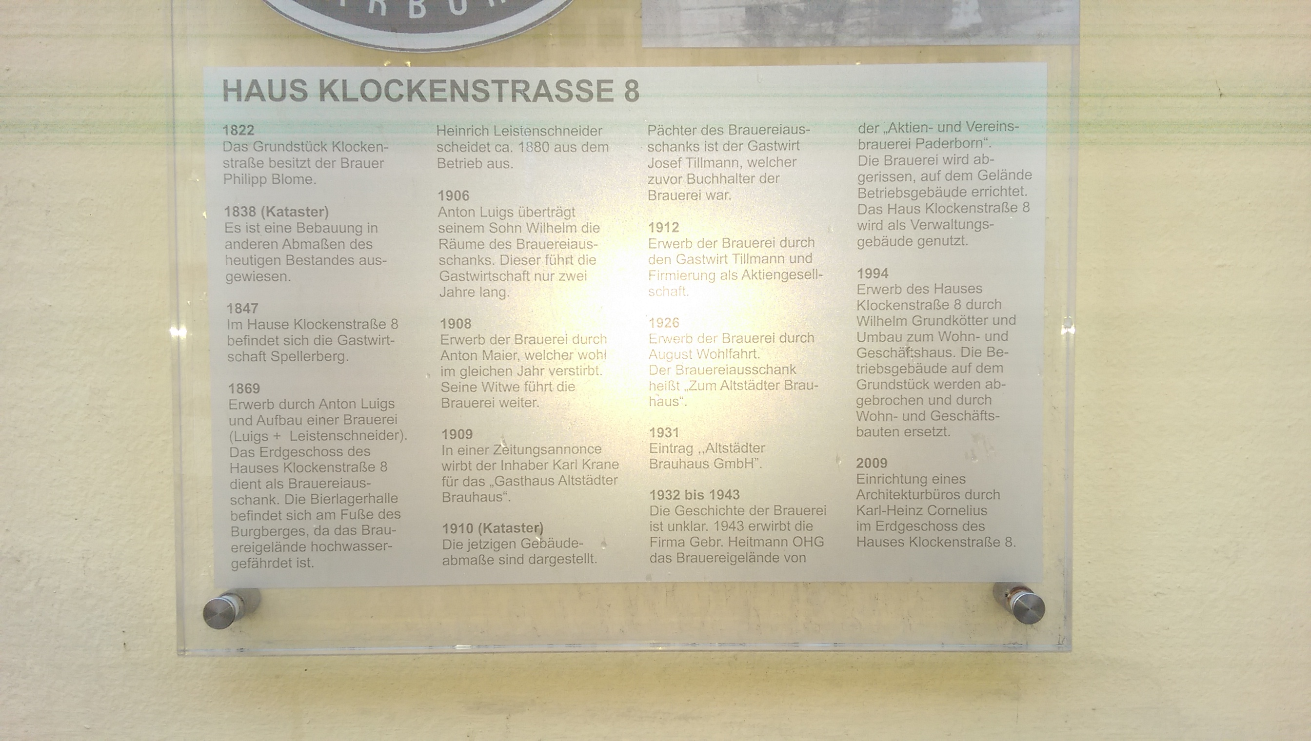 Warburg, Tafel an der Klockenstr. 8